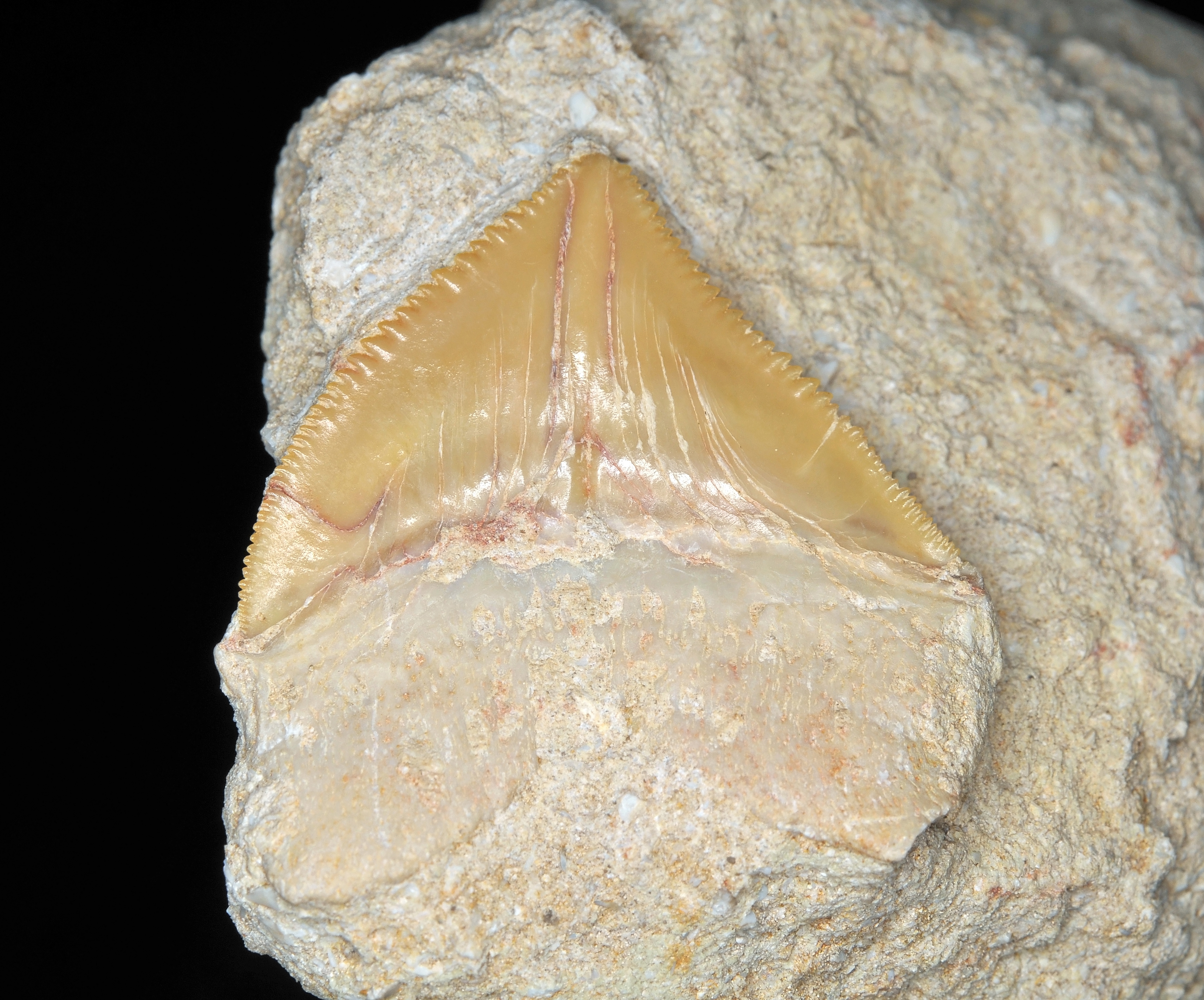 Squalicorax pristodontus Agassiz, 1843 : Erfoud (Arfoud), Meknès-Tafilalet Region, Morocco